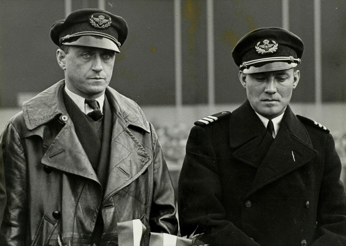 Bemanning "London - Melbourne Race van de Douglas DC-2 "Uiver": vlnr. tweede Bestuurder J.J. Moll. en gezagvoerder Koene Dirk Parmentier.